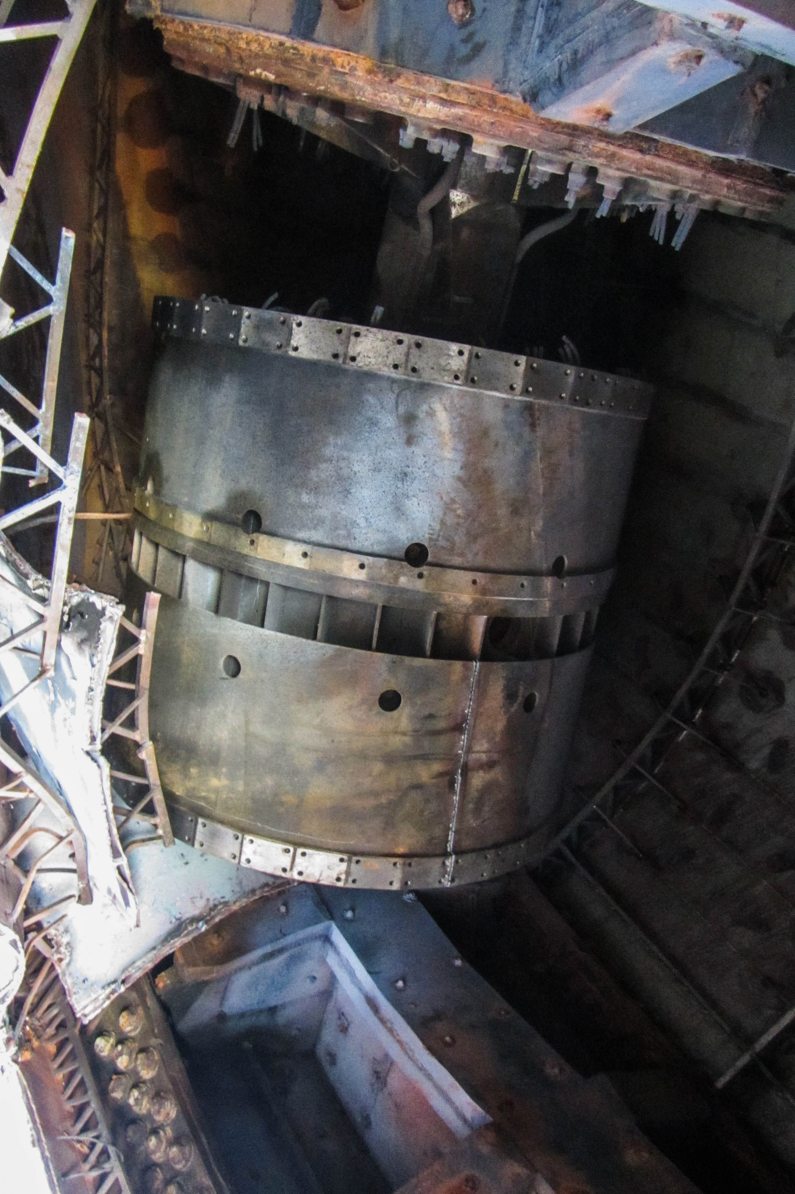 Антенна гидроакустической станции кругового обзора и целеуказания Титан-2. Снято на корабле проекта 1135М Неукротимый